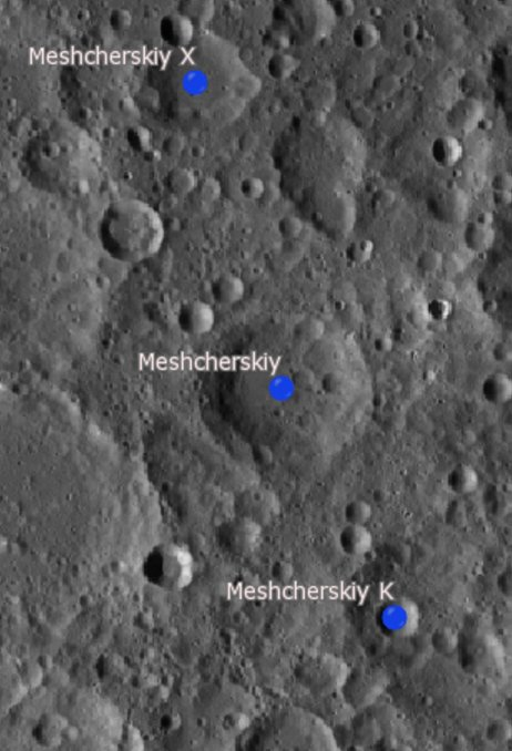 Cráter lunar Meshcherskiy. Cráteres satélite. (Imagen LRO)